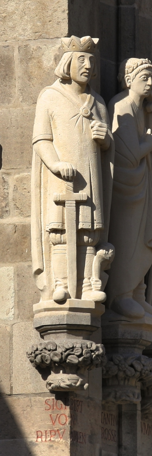 Figur des Sigibert von Ripuarien (auch Sigibert von Köln, Sigibert der Lahme genannt). Thema der Konsole unter der Sigibert-Statue: „Kürbisblatt“. Bildhauer: Matthias Moritz